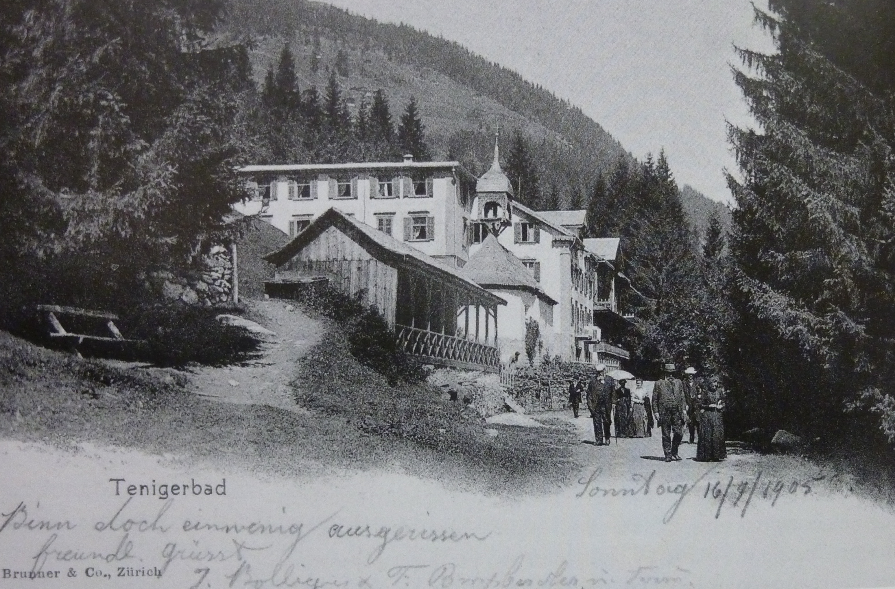 Hotel Tenigerbad im Val Sumvitg